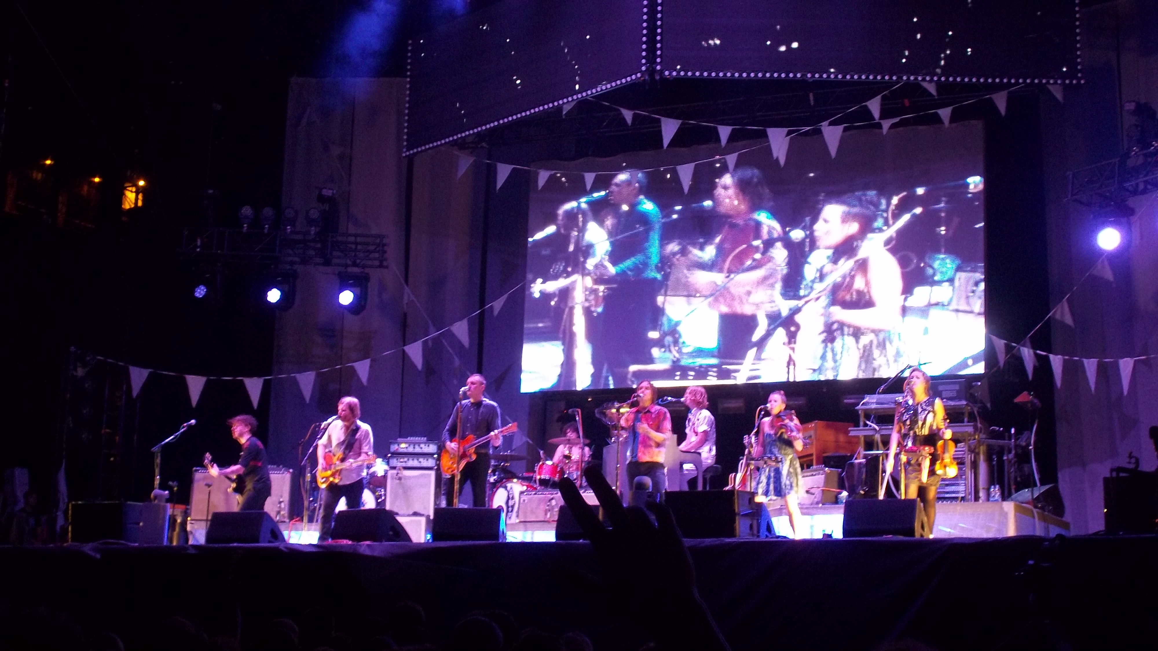 Spectacle gratuit d'Arcade Fire présenté et diffusé en direct par SiriusXM Canada le 22 septembre 2011 à 21:00 à la place des Festivals de Montréal